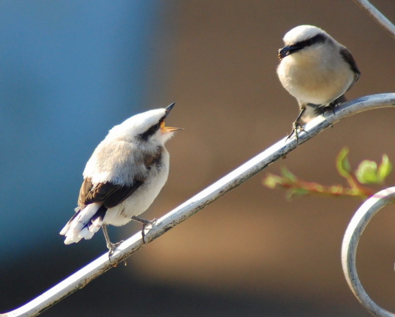 Praça Barão do Rio Branco, Serra Negra-SP